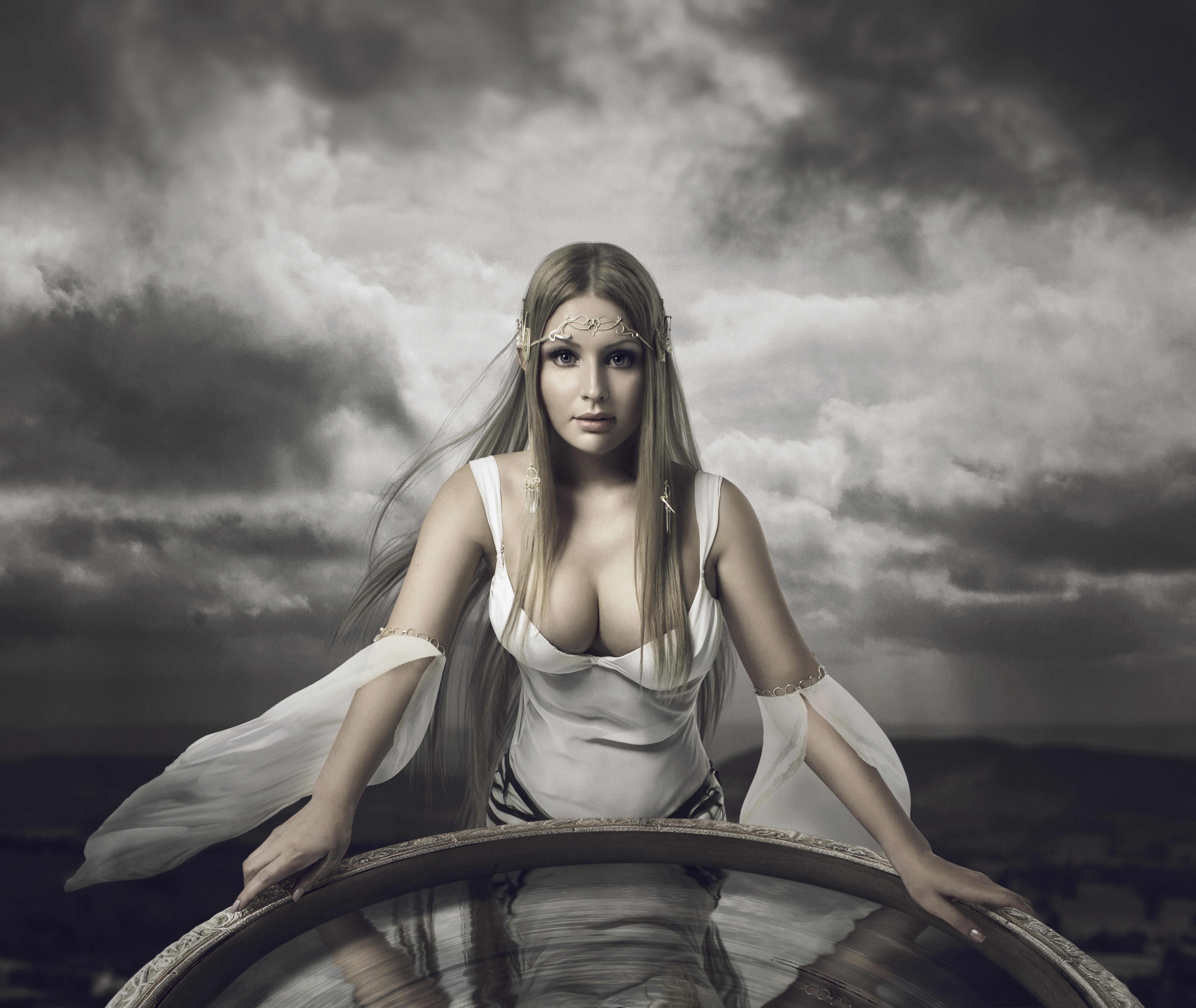 Shaiya Goddess of Light Cosplay